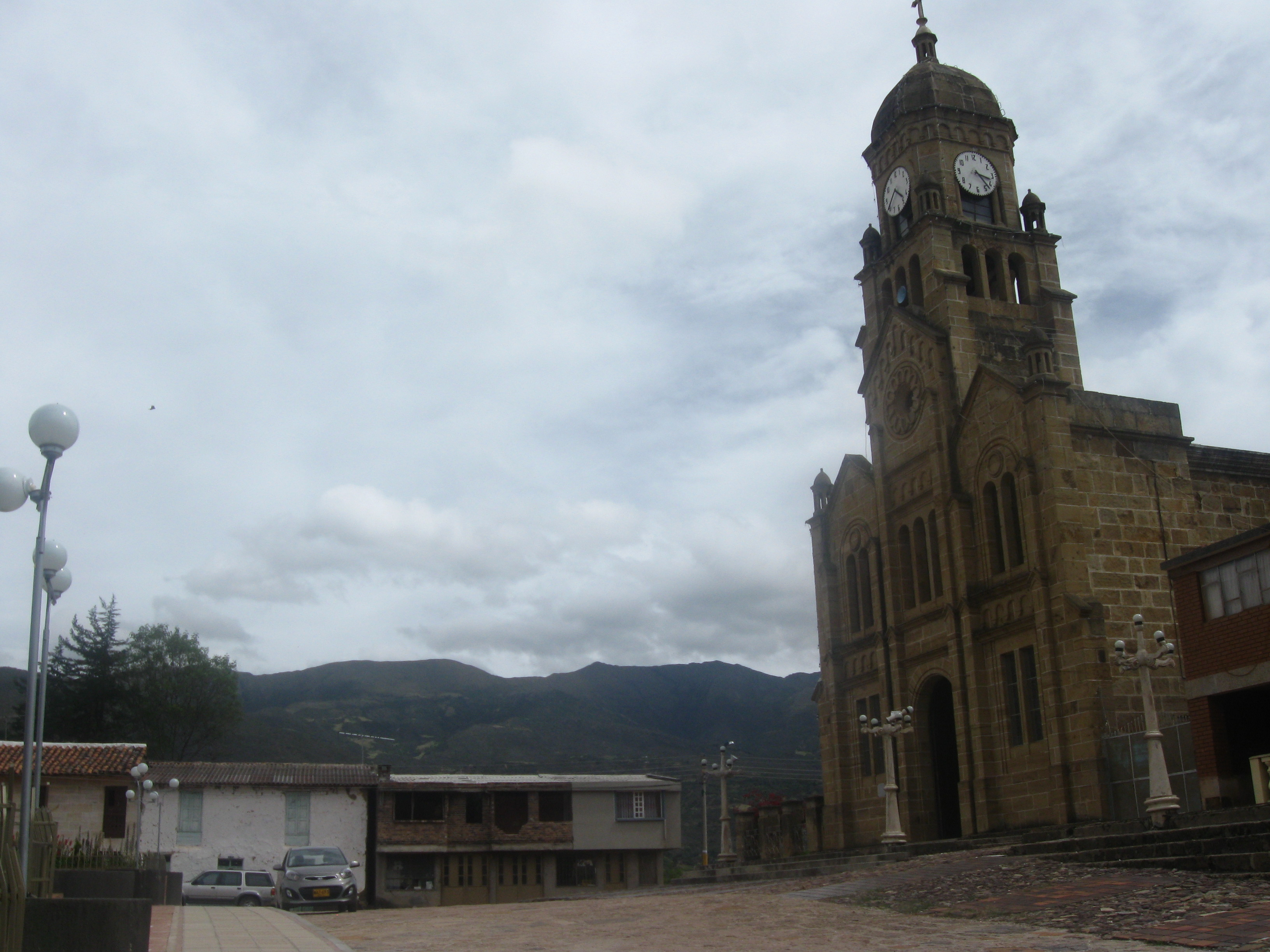 Perfil de la iglesia se Sativasur y de su parque principal.